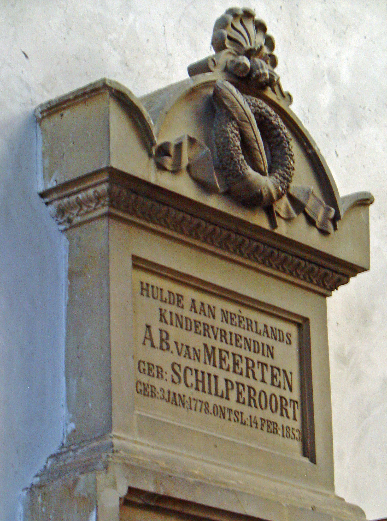 Gedenkteken voor Anna Barbara van Meerten-Schilperoort in de St.-Janskerk te Gouda - het gedenkteken is gemaakt in 1853 door de beeldhouwer J. Stracké uit Rotterdam Categorie:Afbeelding Gouda